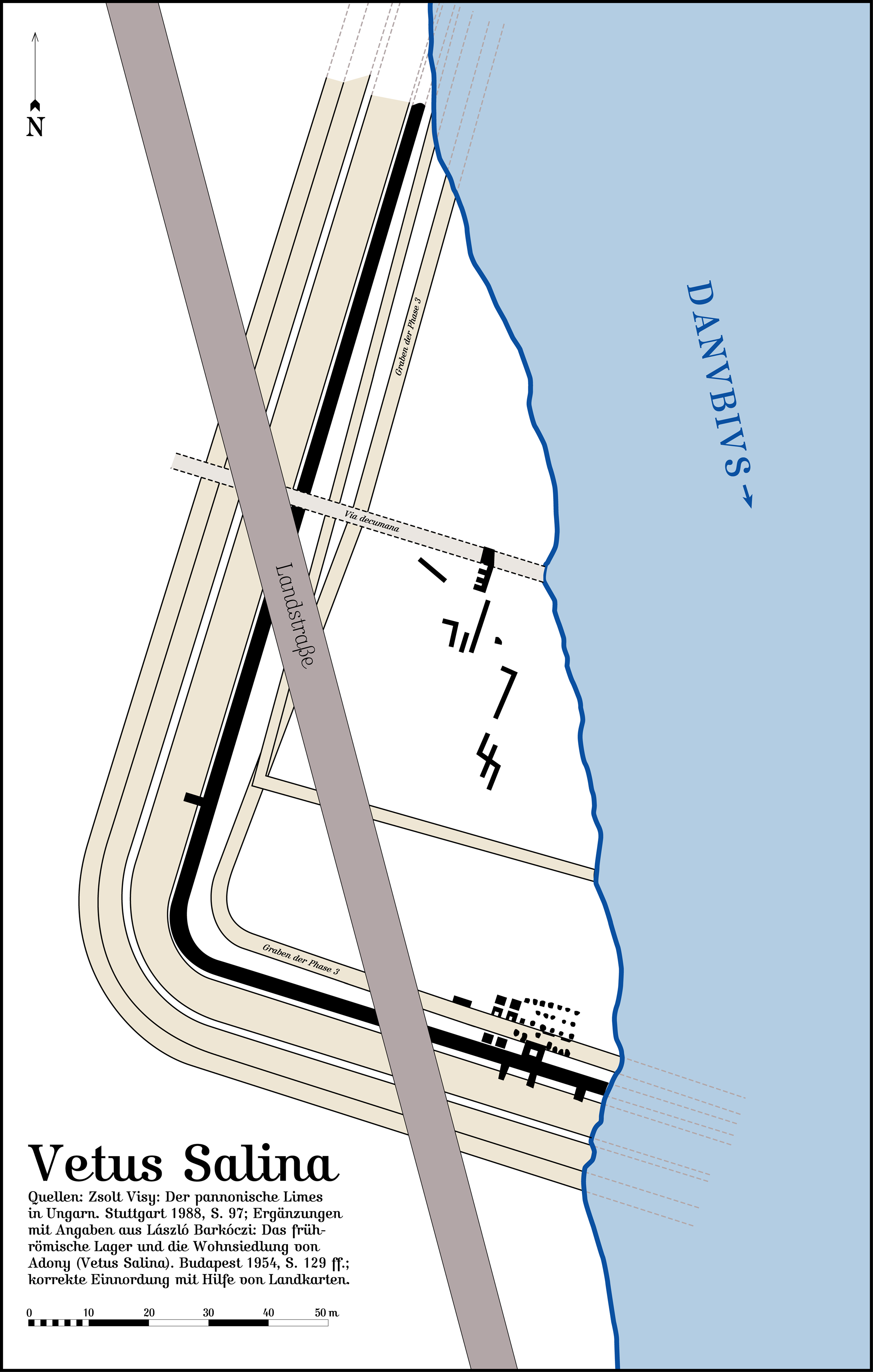 Vetus_Salina, Gesamtplan der Grabung von 1949–1950. Die Quellenangebe befindet sich im Bild integriert!